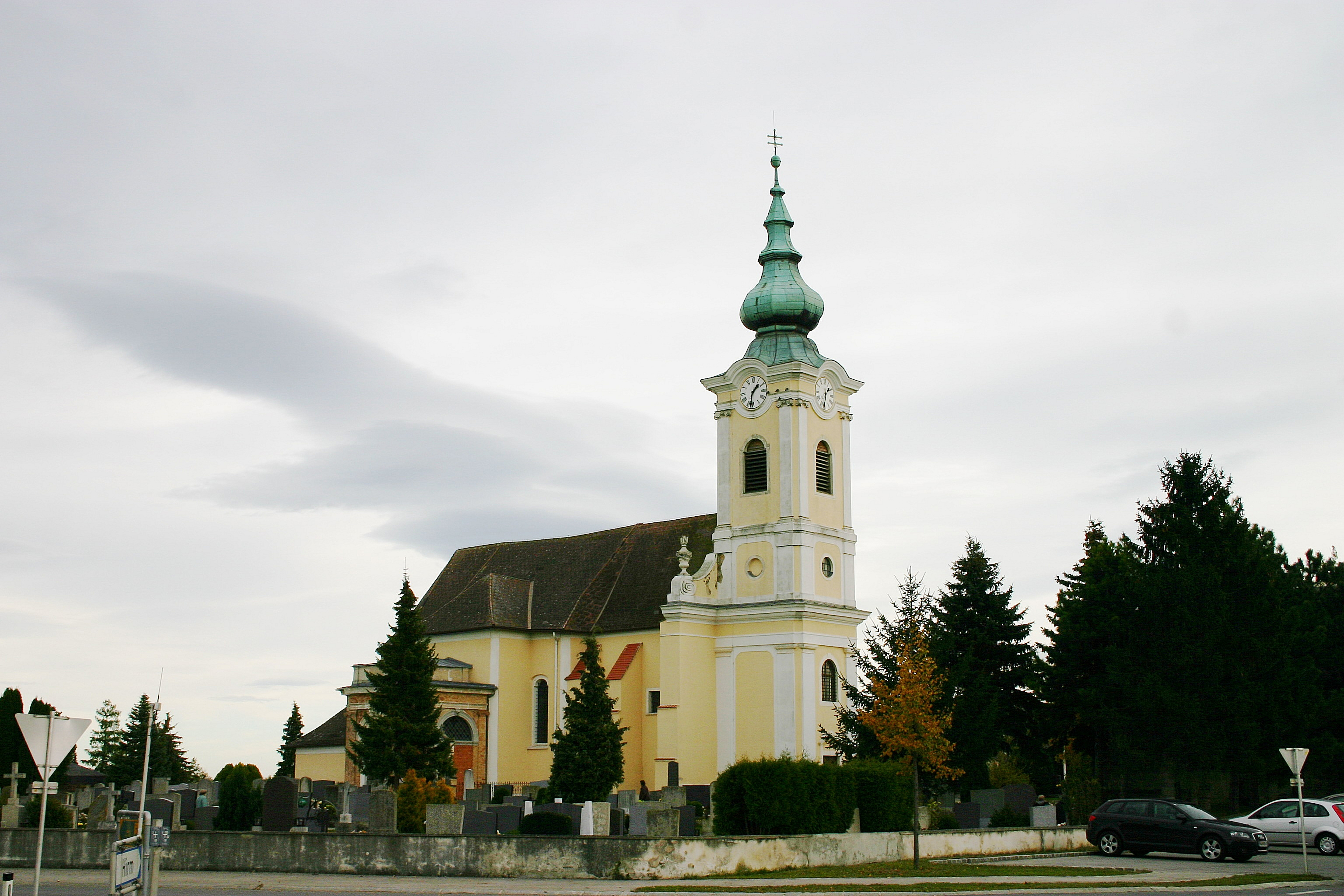 Zemendorf-Stöttera – römisch-katholische Pfarr- und Wallfahrtskirche „Mariae Himmelfahrt“ im Ortsteil Kleinfrauenhaid